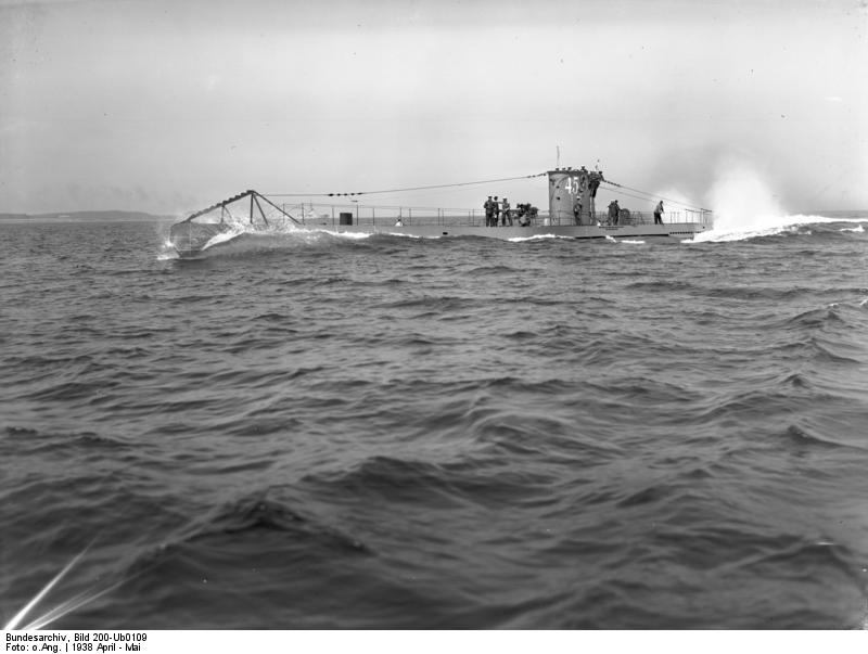 U-45 auf Meilenfahrt Meilenfahrt G.580 / U45 [U-Boot U-45.- Meilenfahrt vor Indienststellung.]